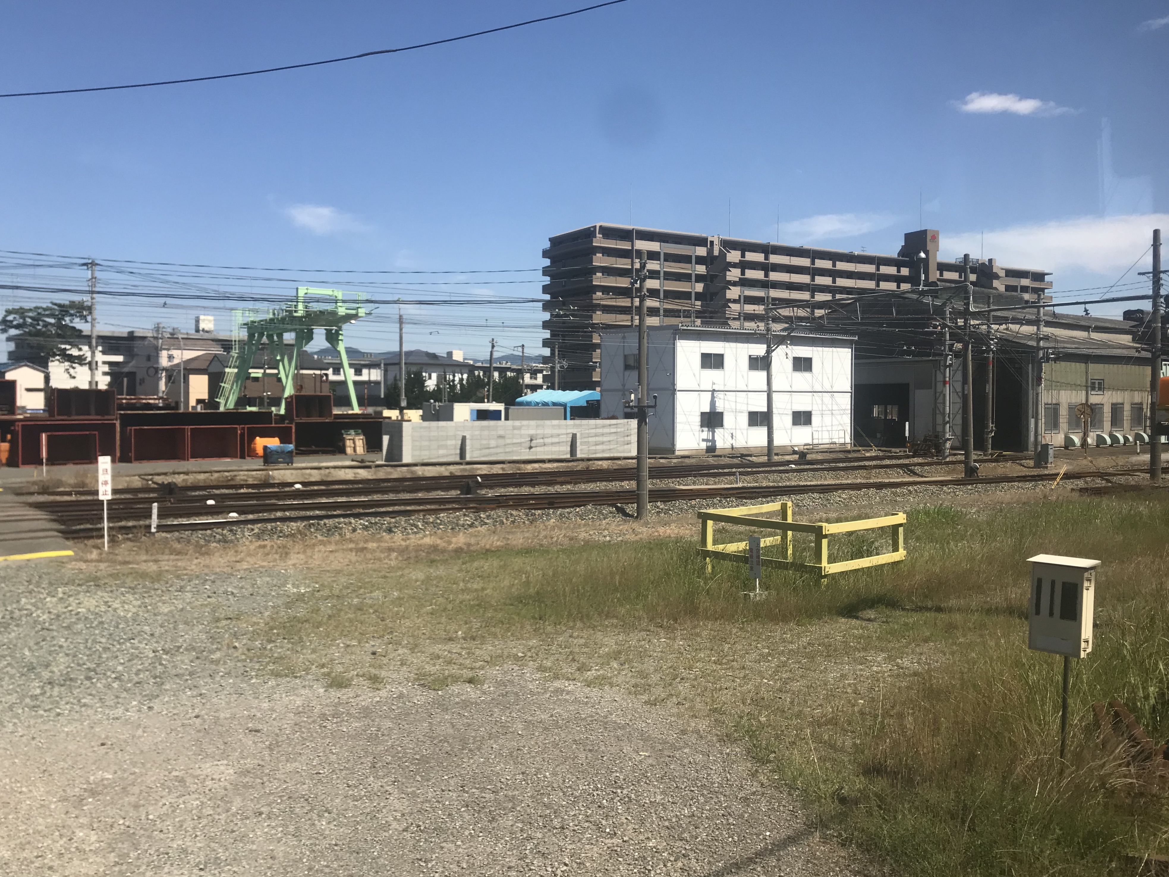 西鉄貝塚線の列車内より望む多々良車両基地